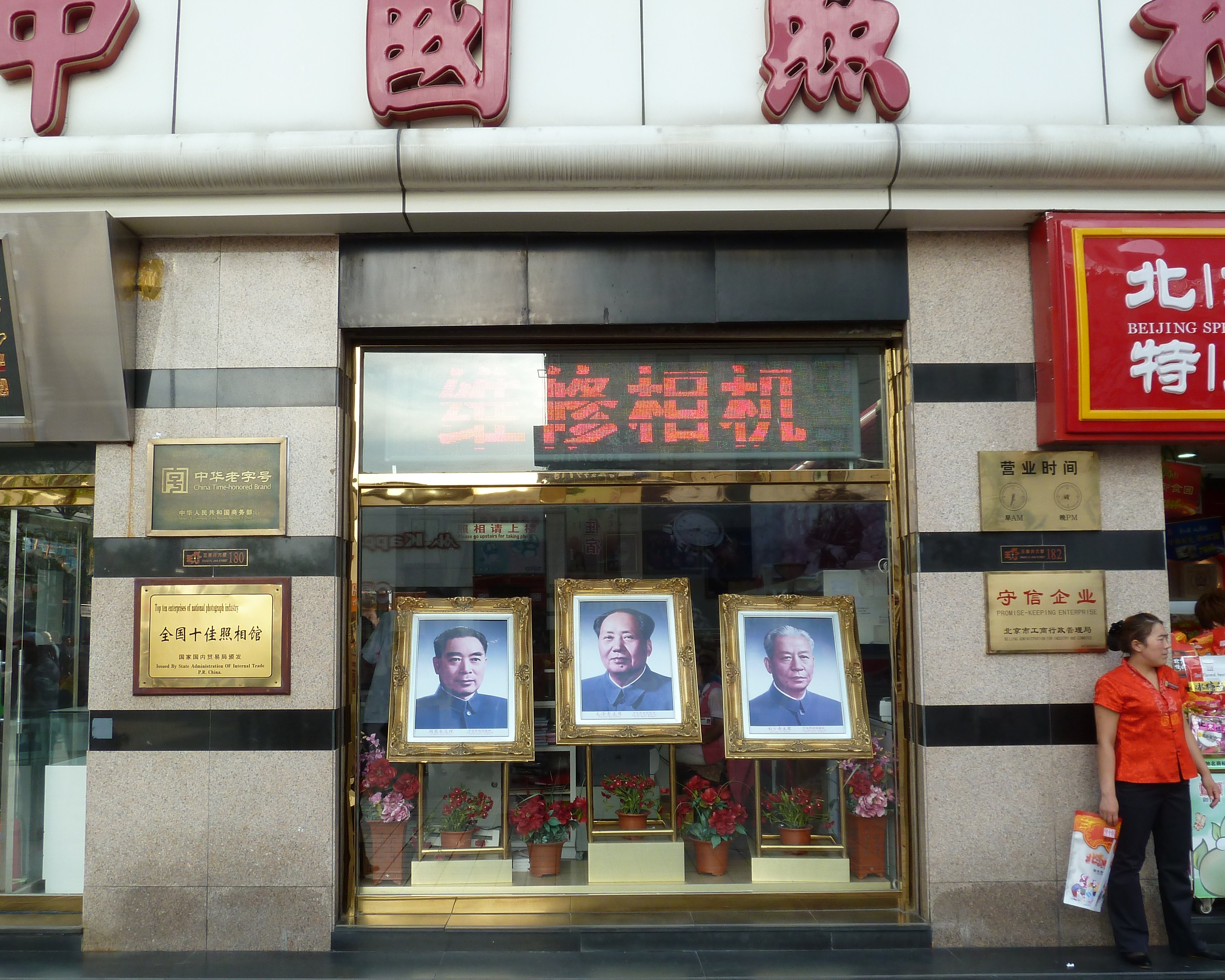 Dans Pedestrian zones in Wangfujing l, à Pékin .- ,Chine